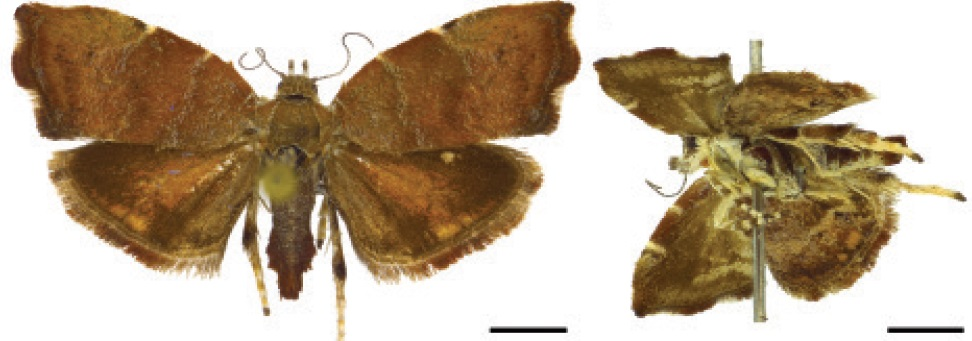 Choreutis nemorana